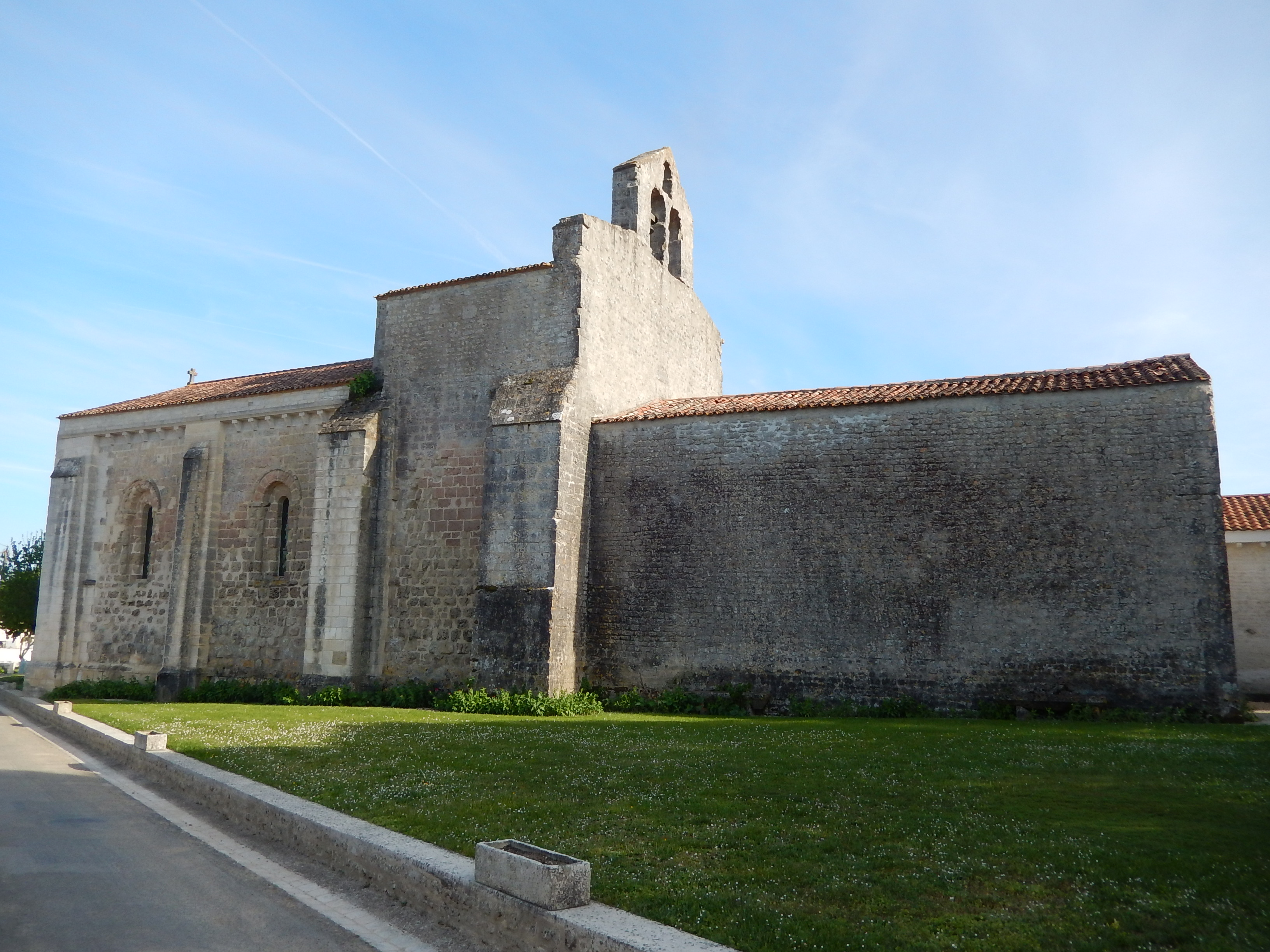 L'église Saint-Révérend de La Croix-Comtesse (Charente-Maritime, France). Façade nord.